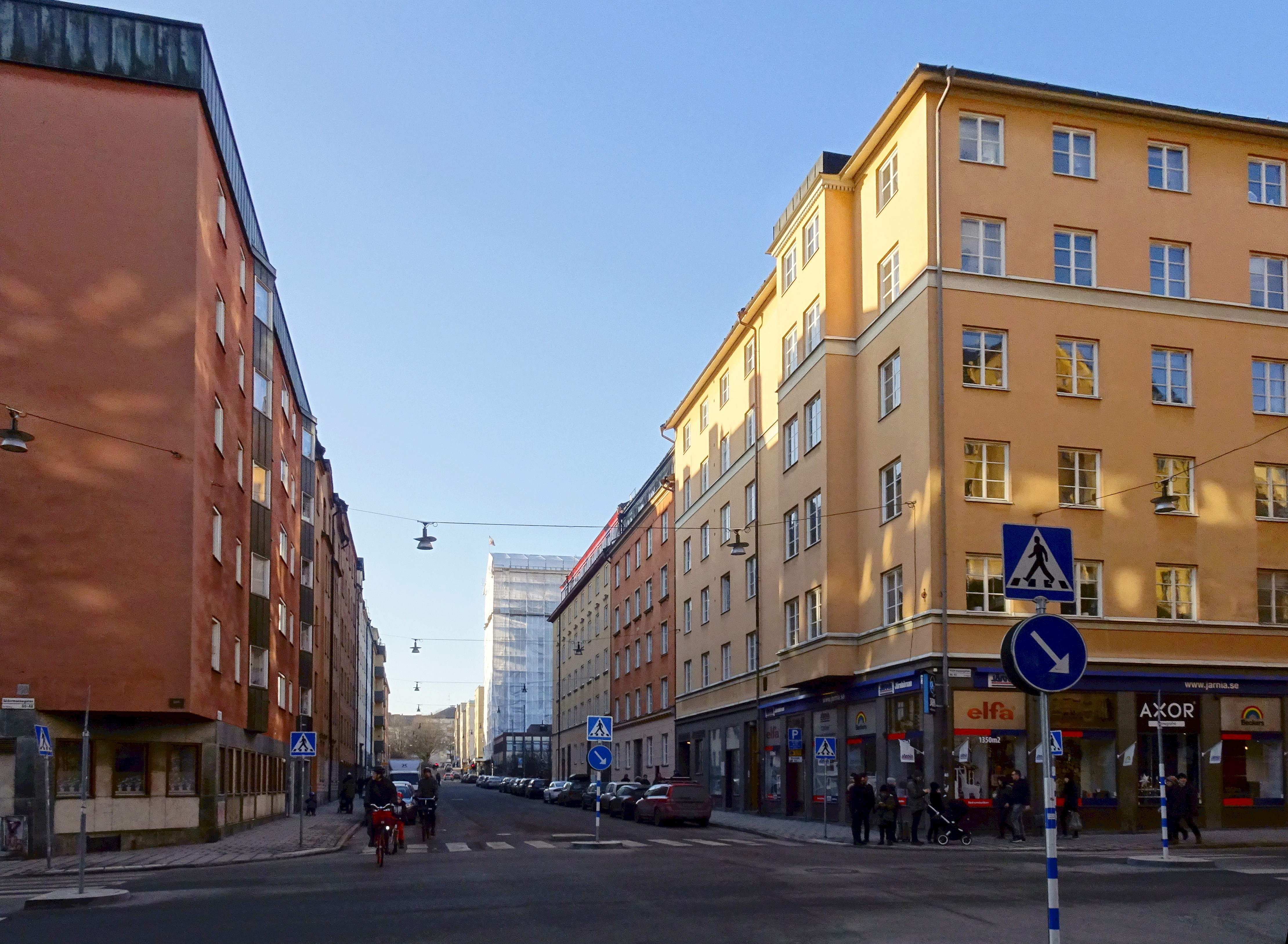 Gotlandsgatan mot väster vid Södermannagatan, hörnhuset är ritat av Björn Hedvall 1927